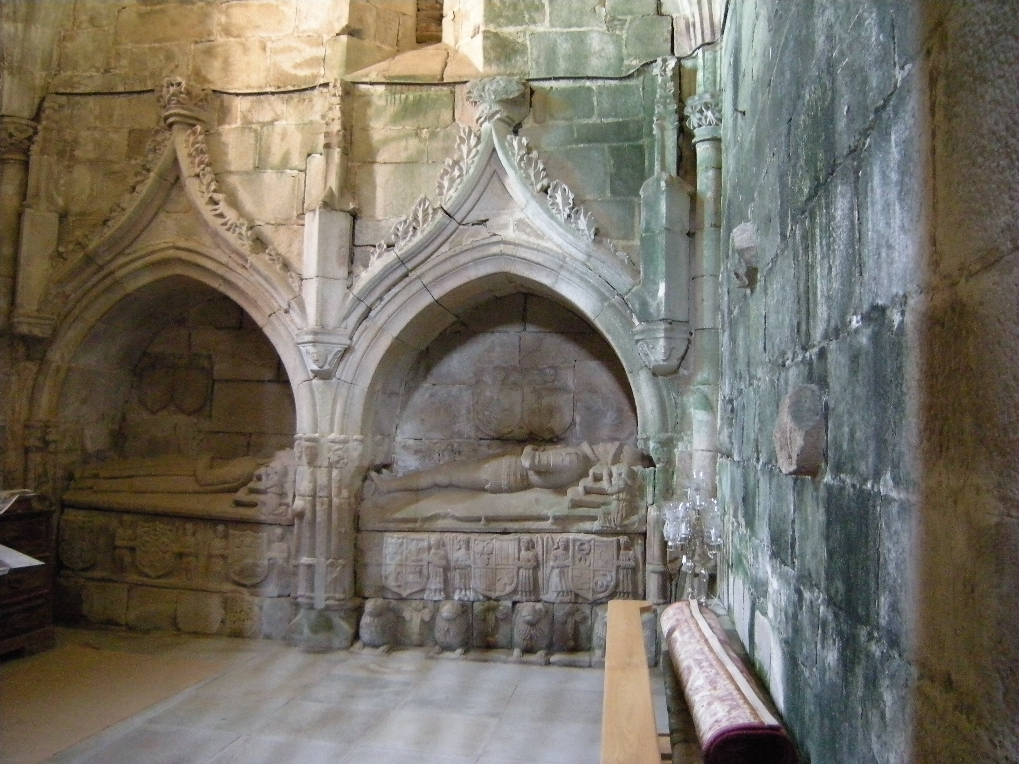 Capilla funeraria de estilo gótico, en donde se encuentran los sepulcros de los condes de Taboada.